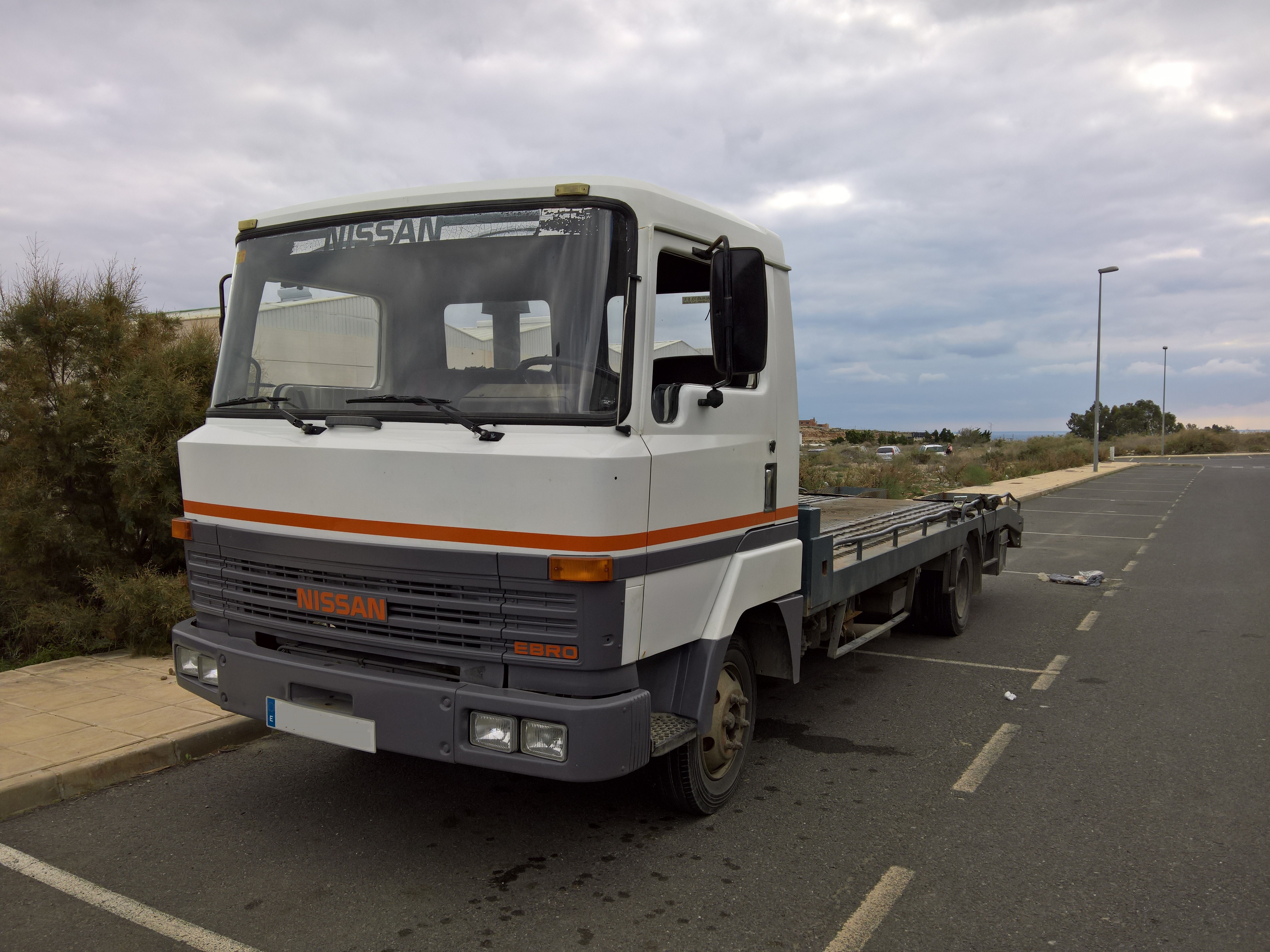 Cami'on Ebro serie L con frontal Nissan Ebro